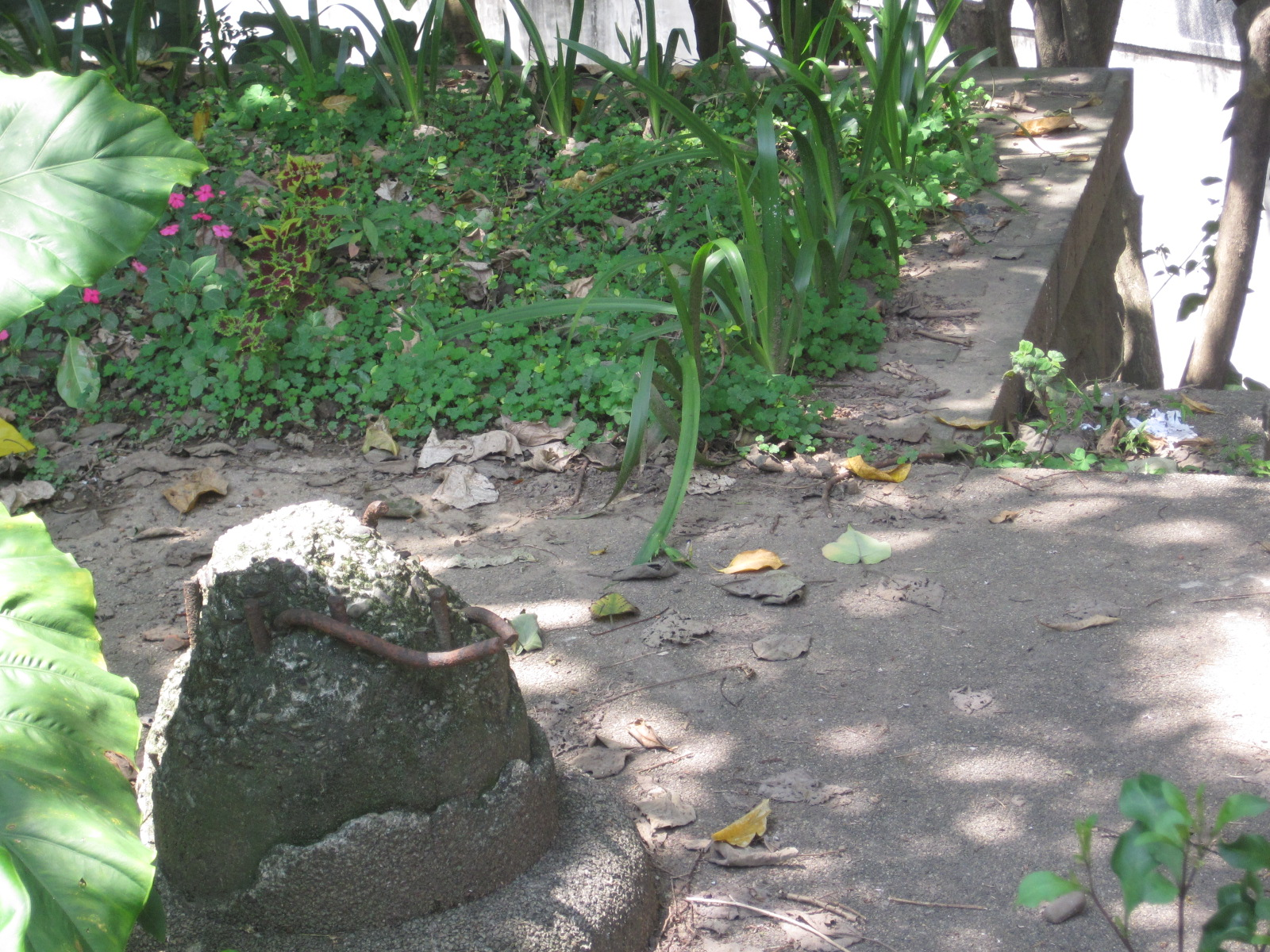 中文（台灣）: 海山神社第三鳥居殘蹟。